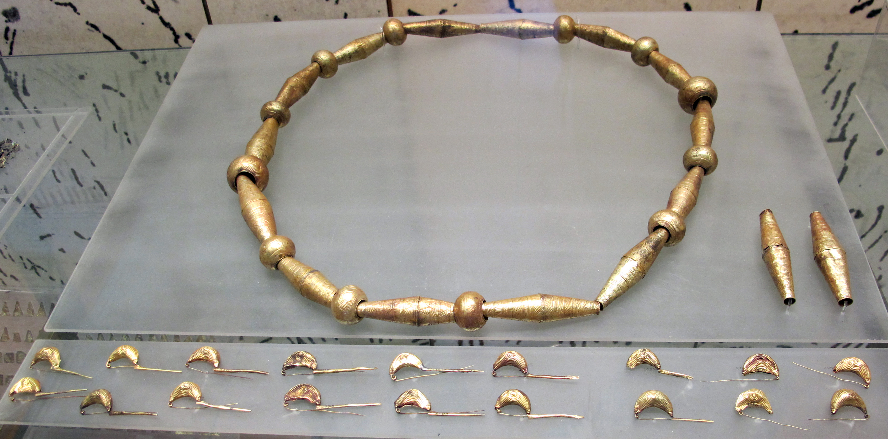 Museo Gregoriano Etrusco